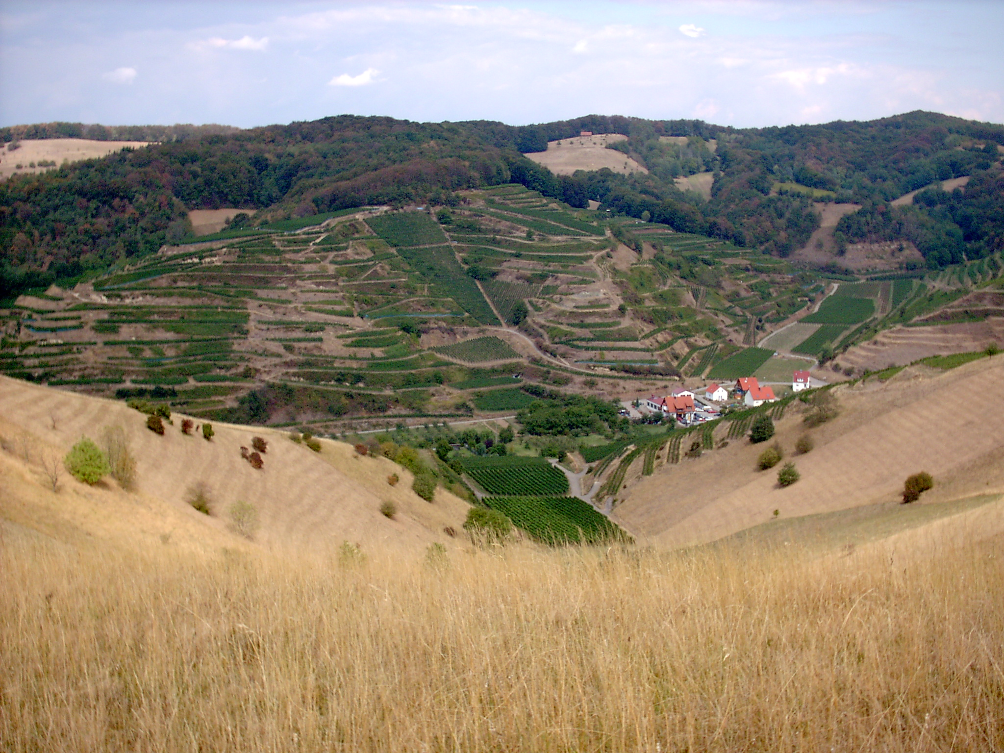 Deutschland - Baden - Kaiserstuhl (Baden-Württemberg): Standpunkt NSG Badberg (432,7m), Blick in Richtung Schelingen. Im Vordergrund ein Trockental, dahinter die Rebterrassen und der bewaldete Kamm des Kaiserstuhl. Das Photo dokumentiert die außergewöhnliche Hitze des Jahres 2003, deutlich zu sehen an der ausgedorrten Vegetation.